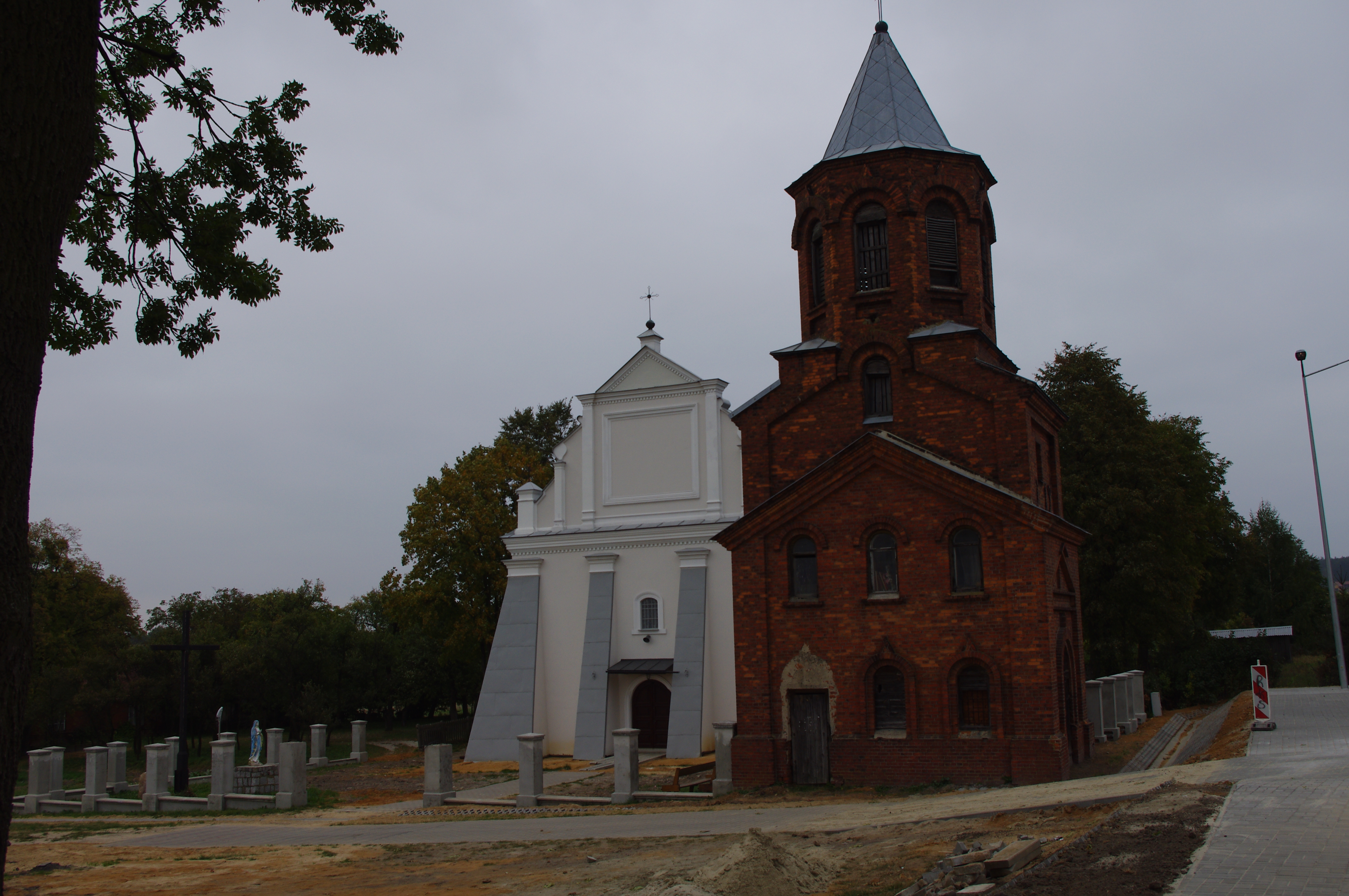 Podgórze - dawna cerkiew prawosławna, obecnie rzymskokatolicki kościół parafialny p.w. Chrystusa Zbawiciela, k. XVI w. (zabytek nr A/195 z 13.02.1967)